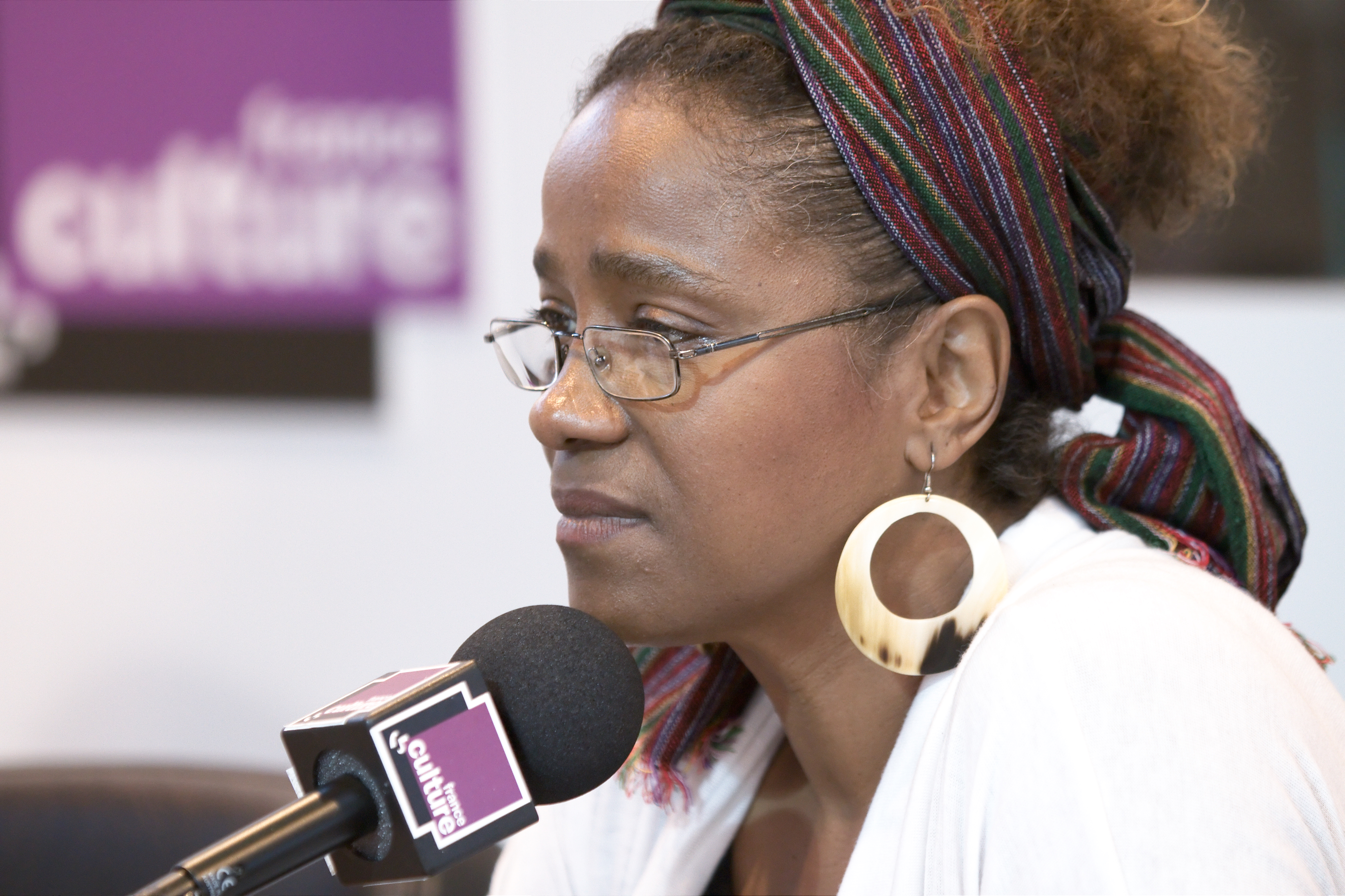 Kettly Mars, alors invitée de l'émission radiophonique À plus d'un titre, animée en direct du Salon du livre de Paris.